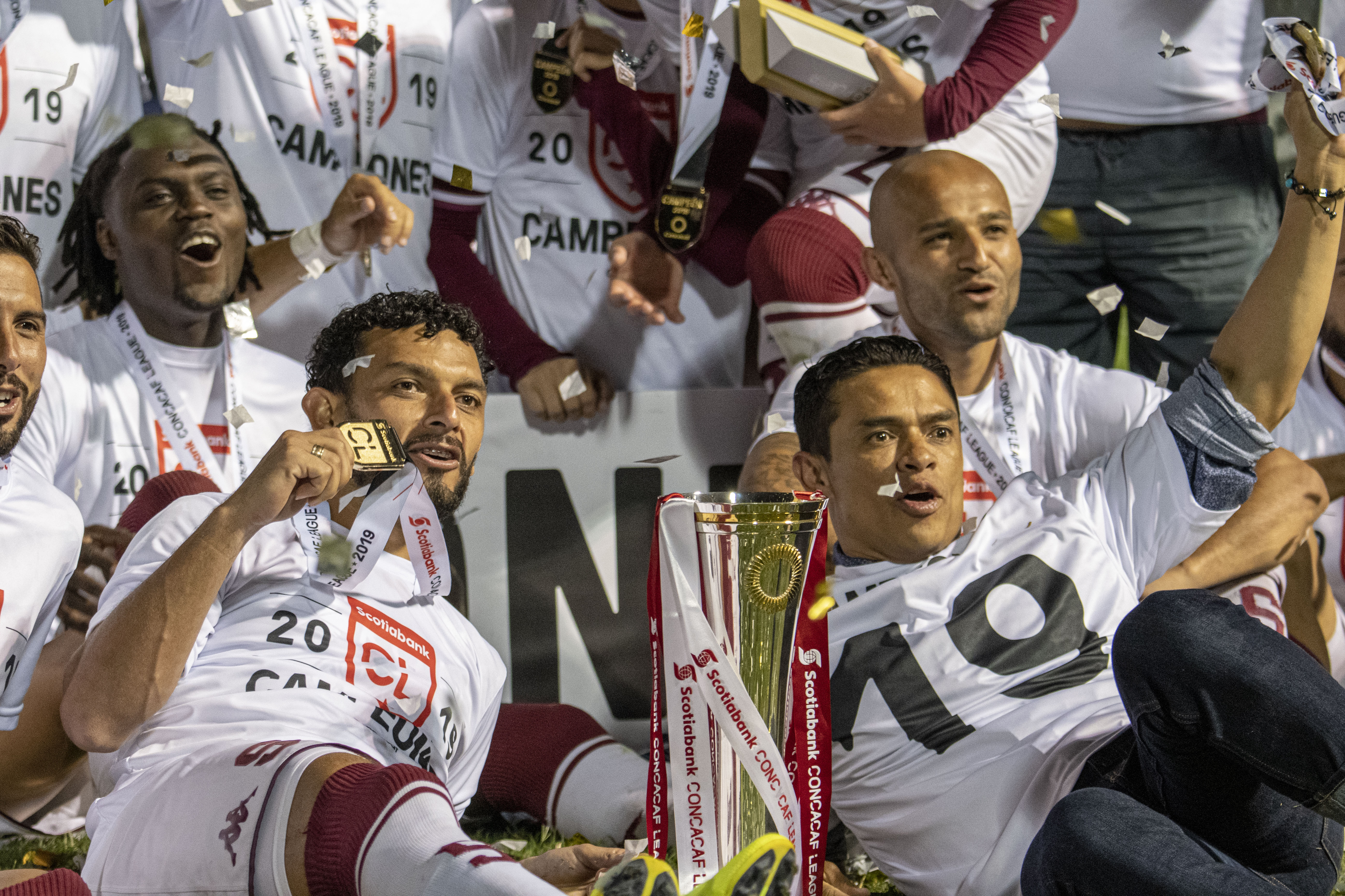 El Deportivo Saprissa festeja su trofeo de campeón de Liga Concacaf tras empatar 0-0 ante el Motagua en el Estadio Nacional de Tegucigalpa. En la foto el entrenador Walter Centeno (derecha) y el capitán Michael Barrantes festejan junto al trofeo.